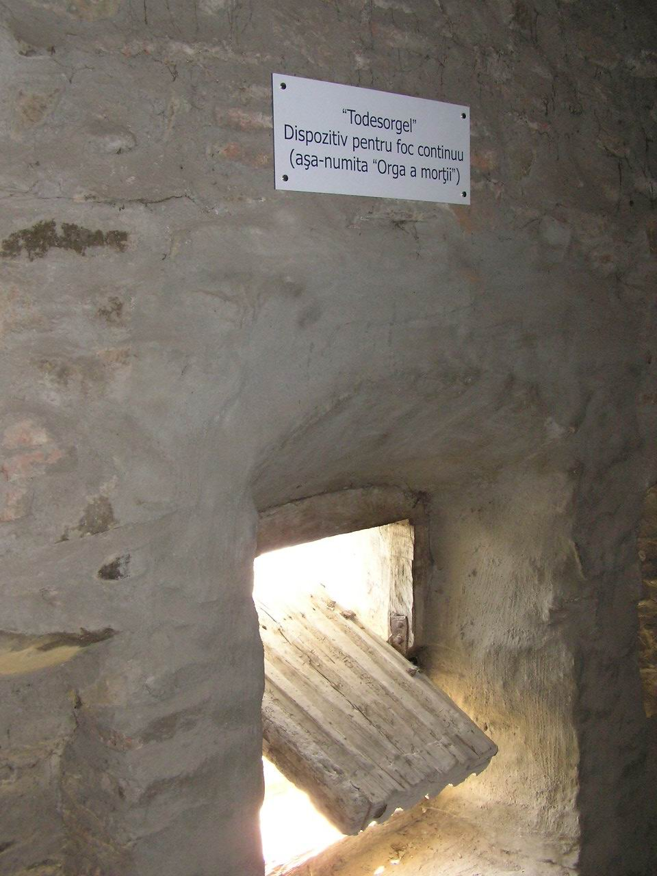 Die "Todesorgel" der Kirchenburg von Prejmer / Tartlau